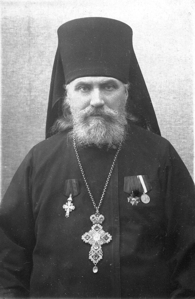 НИКОДИМ (Гонтаренко) архимандрит, наместник Почаевской Лавры